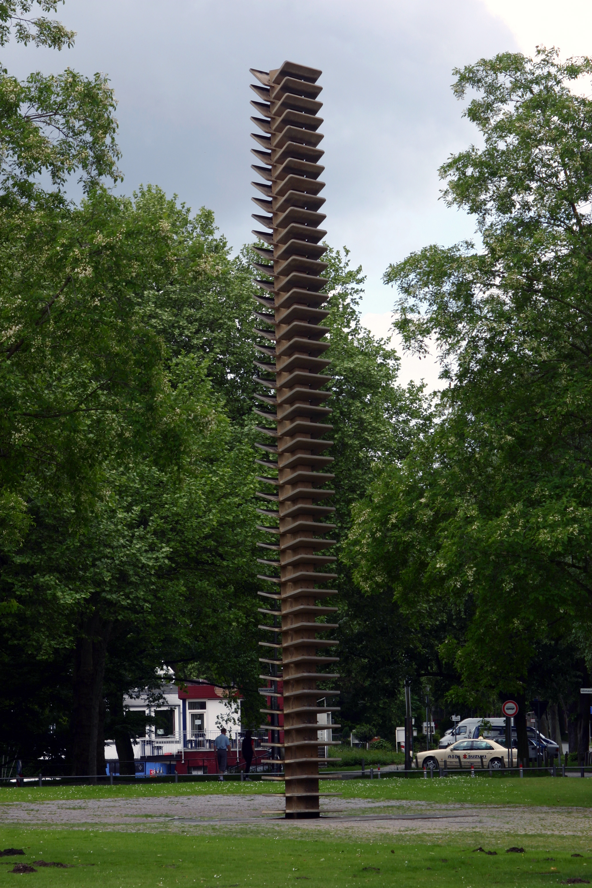 Heinz Mack - Wasserskulptur (1977) - Standort Münster, Himmelreichallee 40